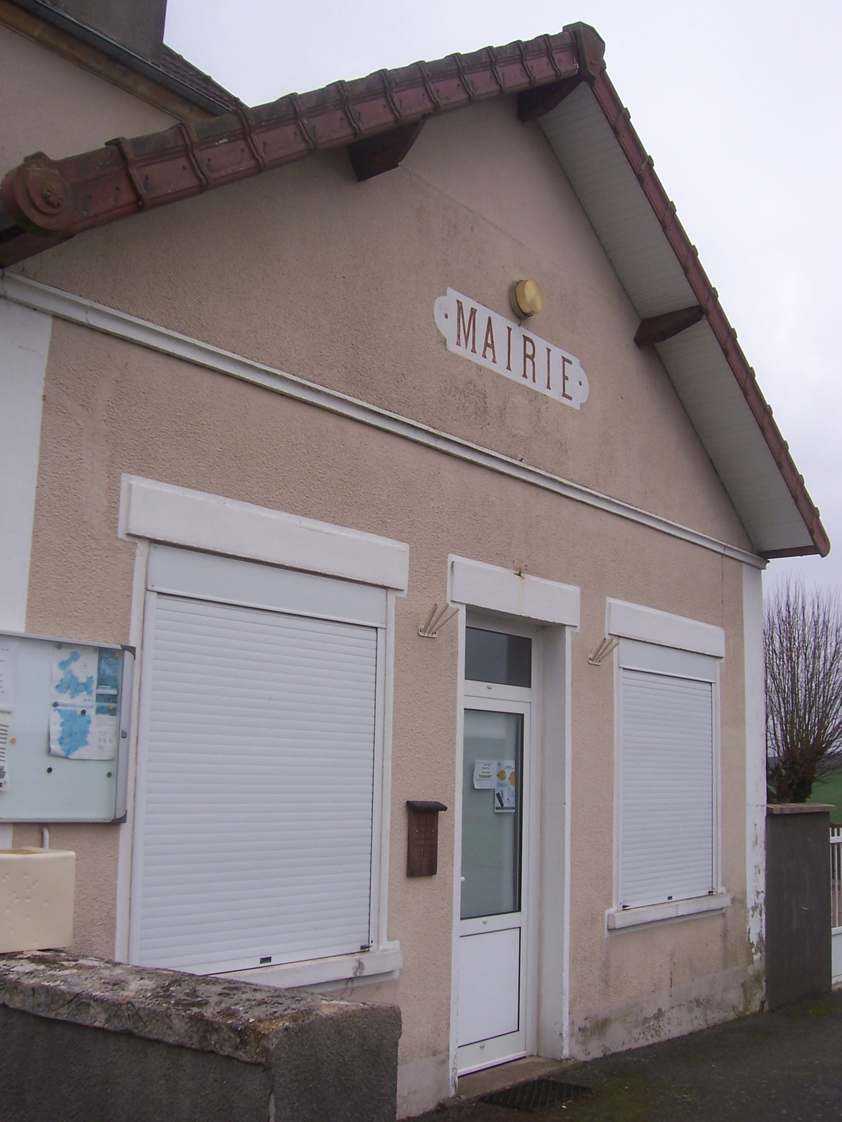 Mairie de Dompierre-sous-Sanvigne